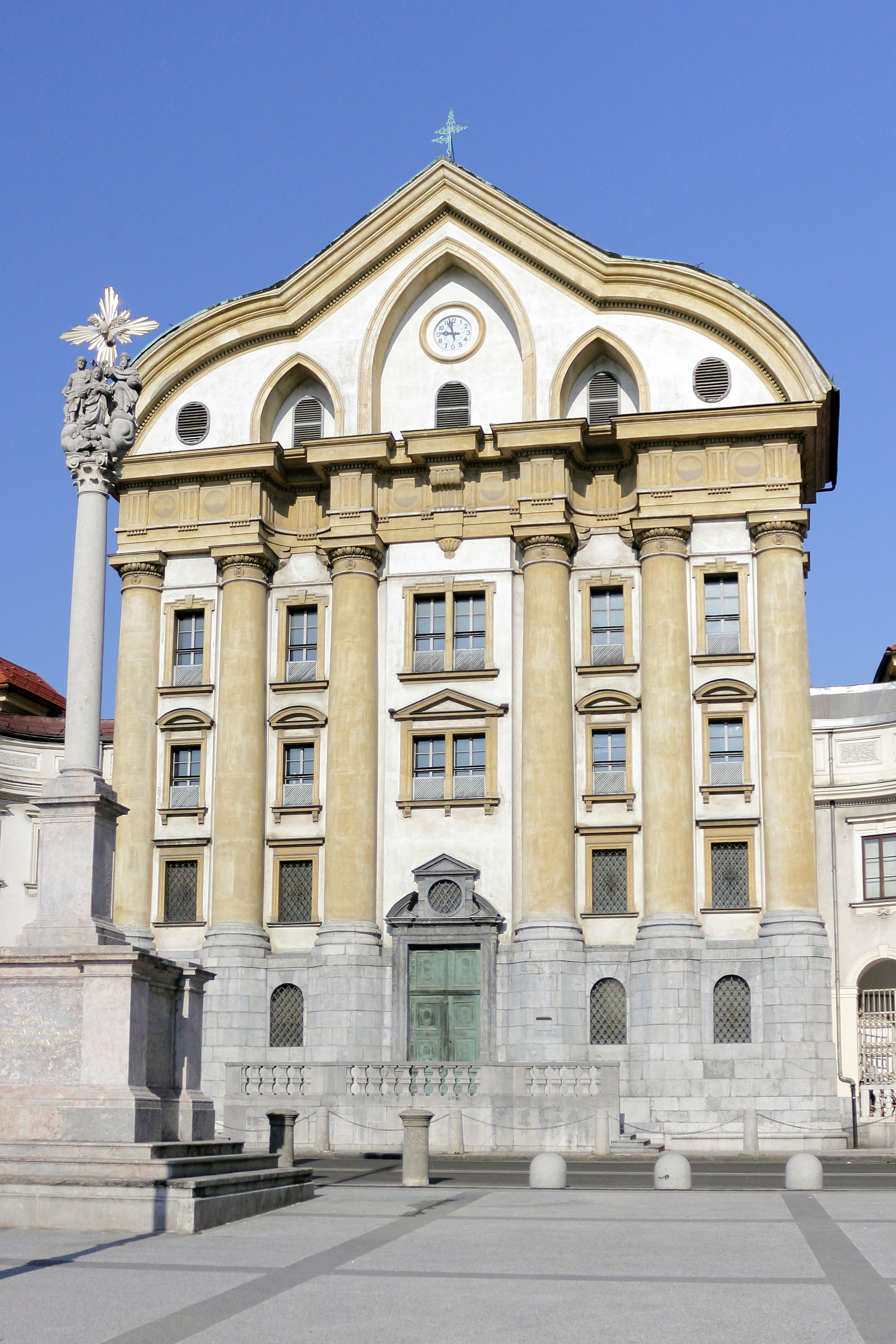 Lubiljana